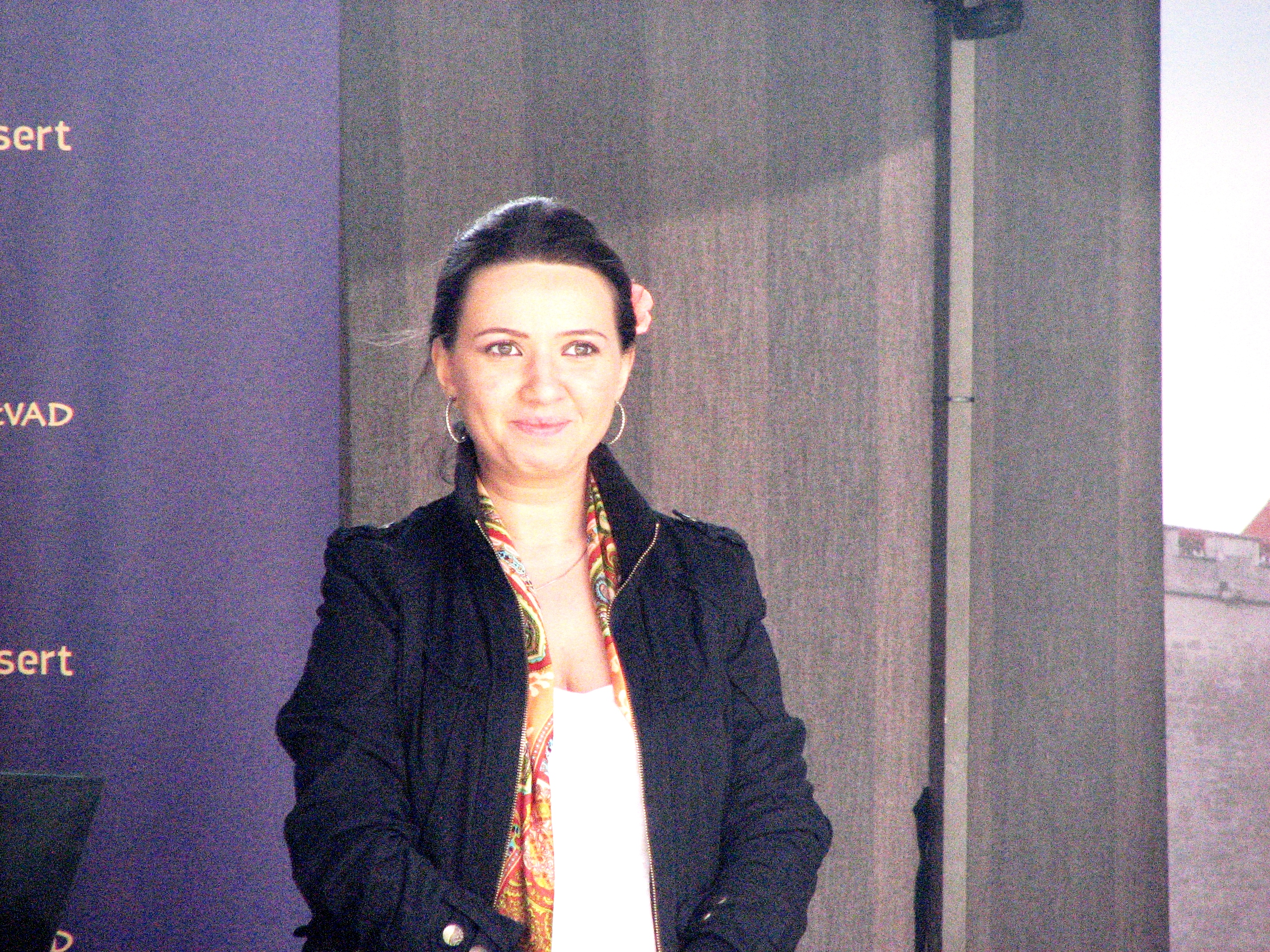 Marika Matšitidze esinemas Kuressaare Arensburgi ooperikohvikus